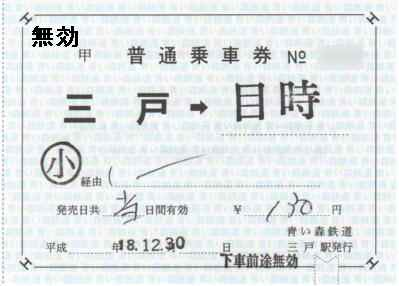 補充片道券(青い森鉄道三戸駅発行)